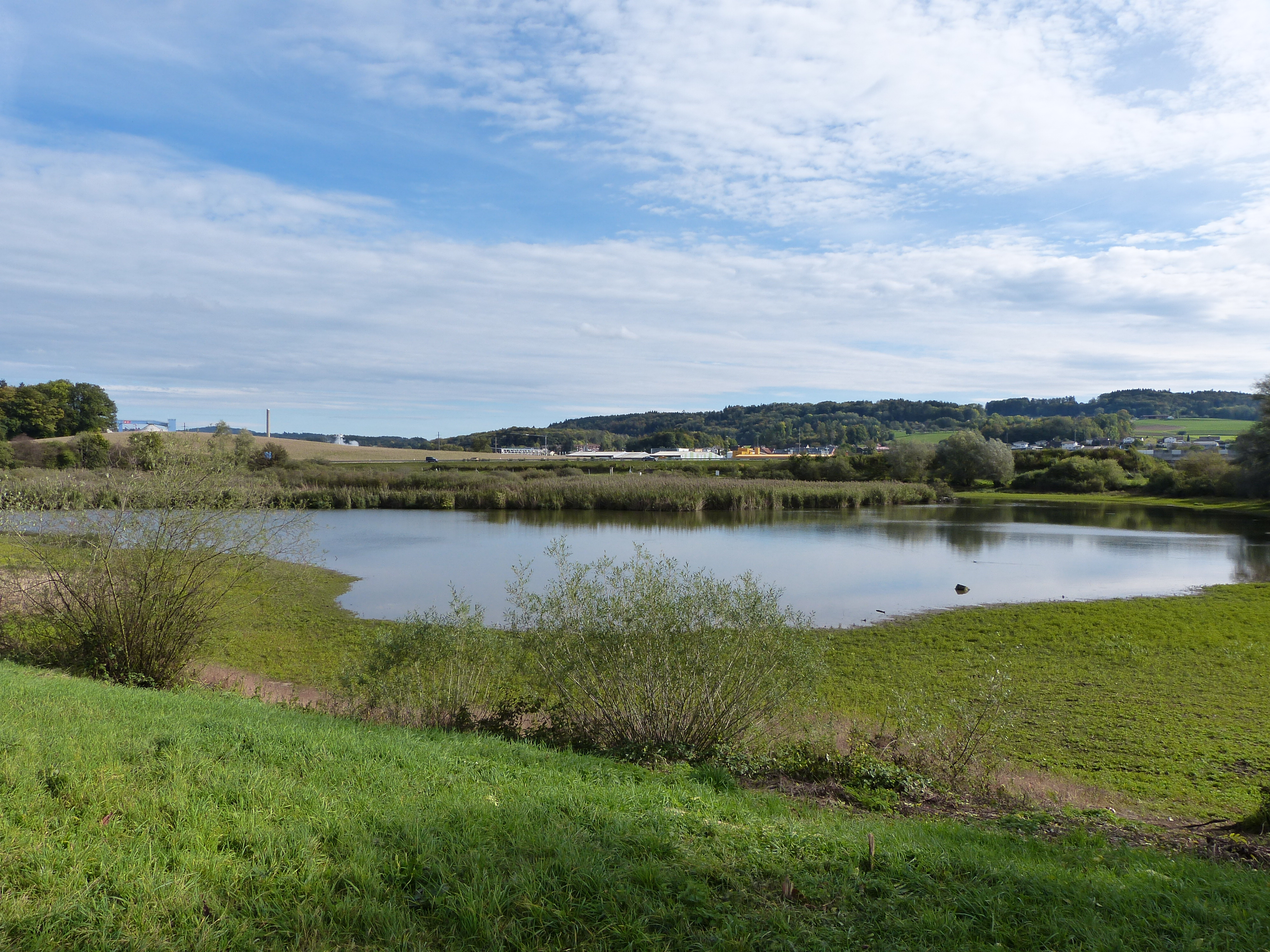 Egelsee (prähistorische Seeufersiedlung)